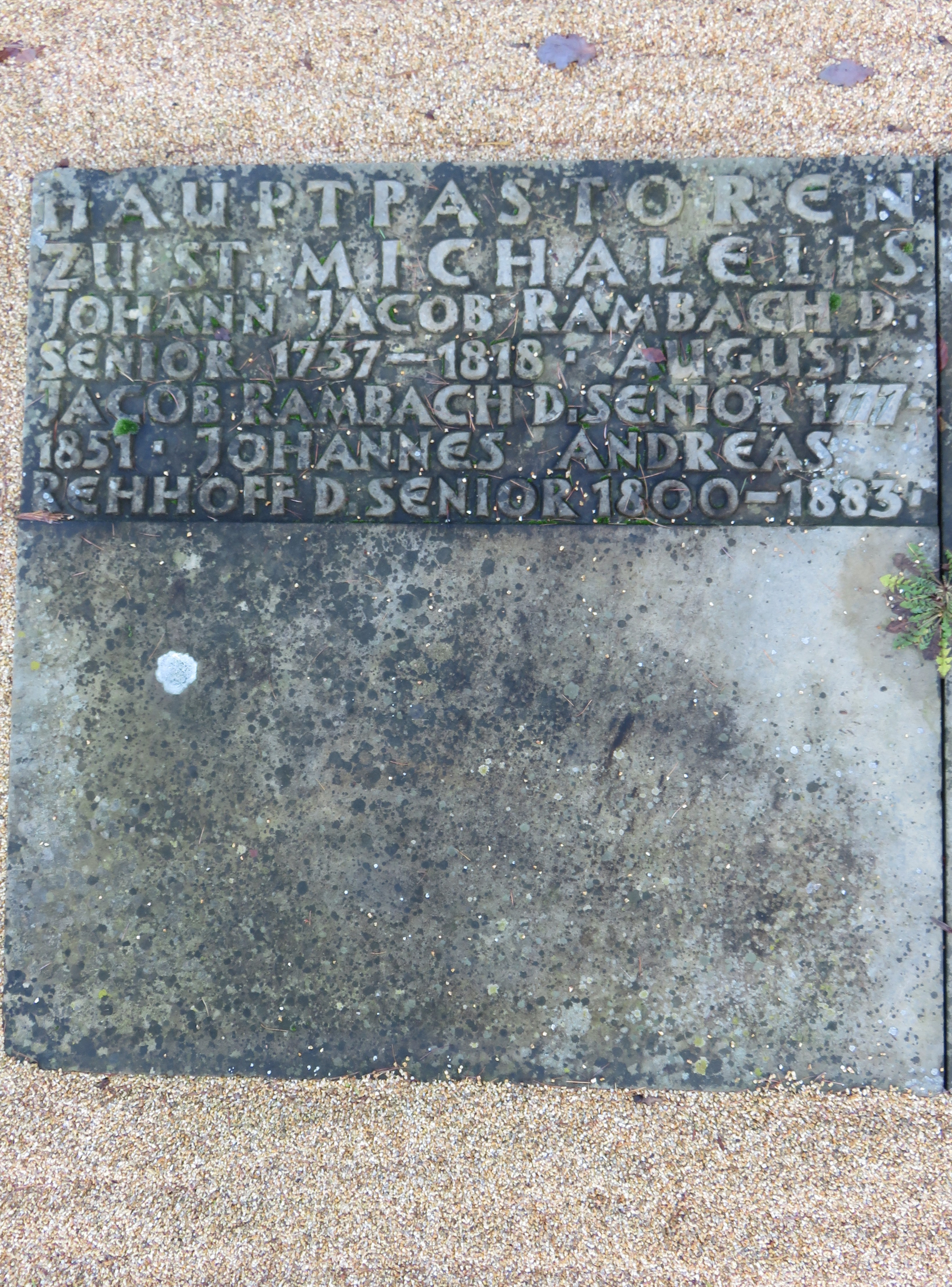 Doppel-Sammelgrabmal Hauptpastoren/Pastoren zu St. Michaelis im Bereich des Althamburgischen Gedächtnisfriedhofs auf dem Hamburger Friedhof Ohlsdorf zu Ehren von unter anderen Johann Jakob Rambach, August Jacob Rambach, Johannes Andreas Rehhoff (linke Platte).